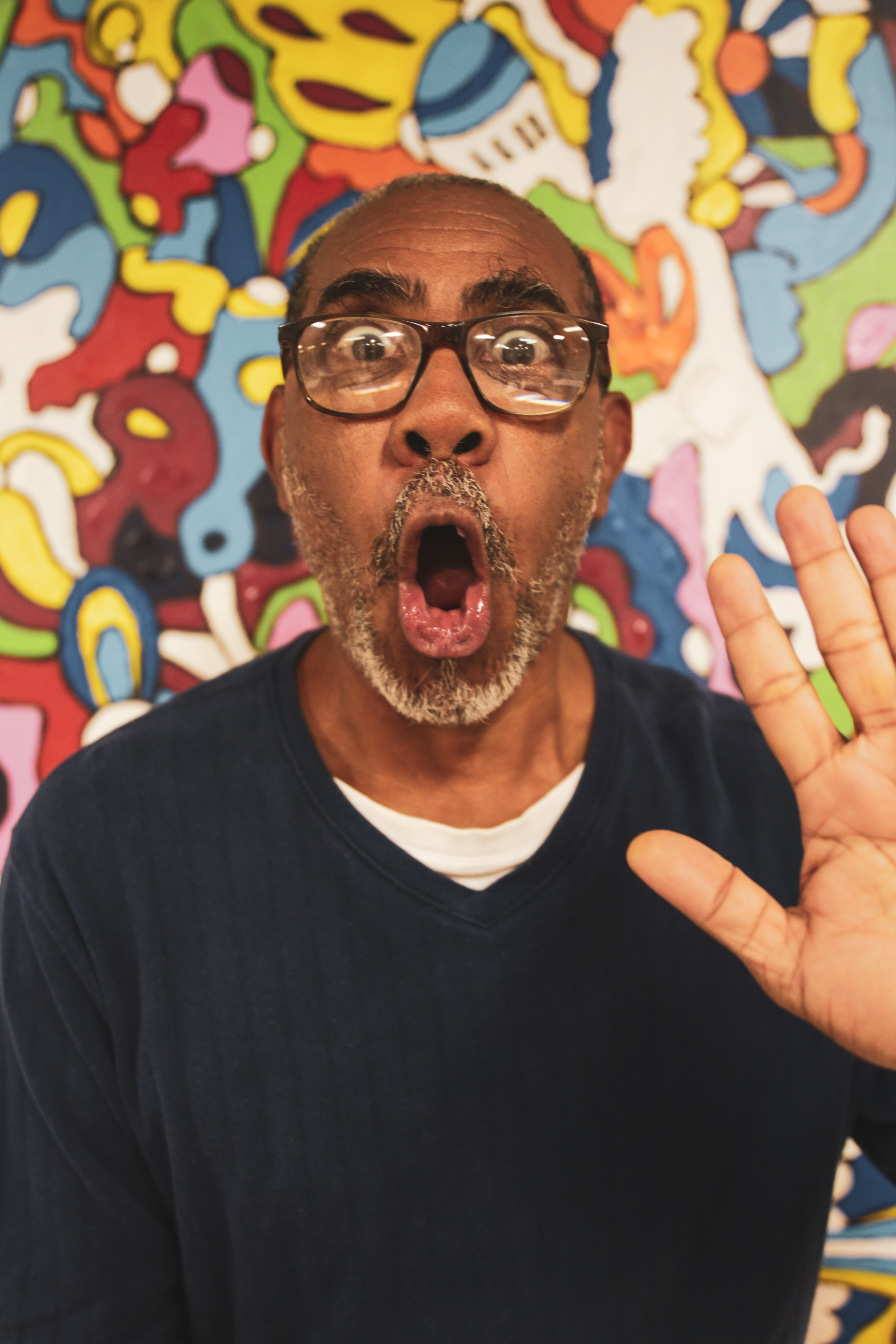 El actor y director ecuatoriano, Lucho Aguirre, en las instalaciones de los estudios de Ecuavisa, al sur de Guayaquil, en 2019.